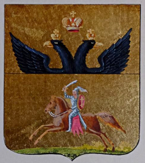 Беларуская (тарашкевіца): Дрыса (Drysa). Герб места з «Пагоняй» («Pahonia»)